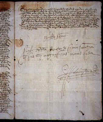 Letter From Admiral Diego Colón To Fray Francisco Ximénex De Cisneros, Cardinal Archbishop of Toledo Espaniola, 1412 The son of Christopher Columbus (Colón in Spanish), Diego inherited his father's title of Admiral of the Ocean Sea. He ultimately held the additional titles of governor and viceroy of the Indies. This letter to Cardinal Ximénez de Cisneros deals with conditions among the Indians in the Caribbean.